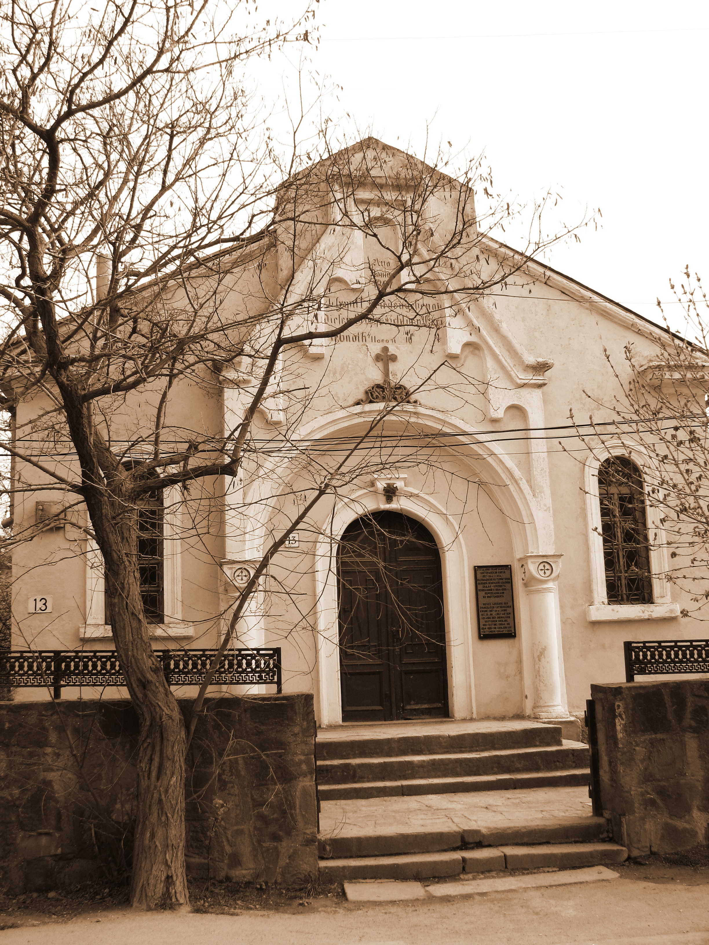 Немецкая лютеранская кирха 1887, Судак, Крым